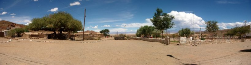 Vista desde la capilla